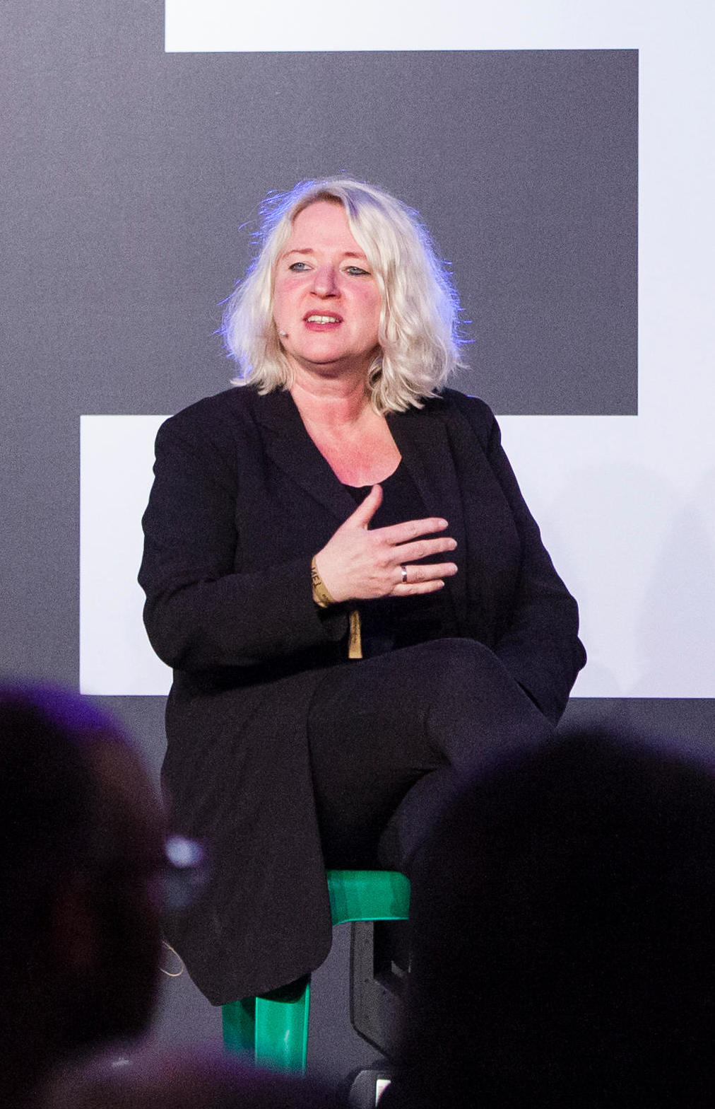 Andrea Kocsis, Malte Spitz, Johannes Kleske und Andreas Dewes mit „Big Data und Arbeitnehmer: Zwischen Selftracking & Corporate Panopticon“ am 04.05.2016 auf der re:publica in Berlin. Foto: re:publica/Jan Zappner CC BY 2.0